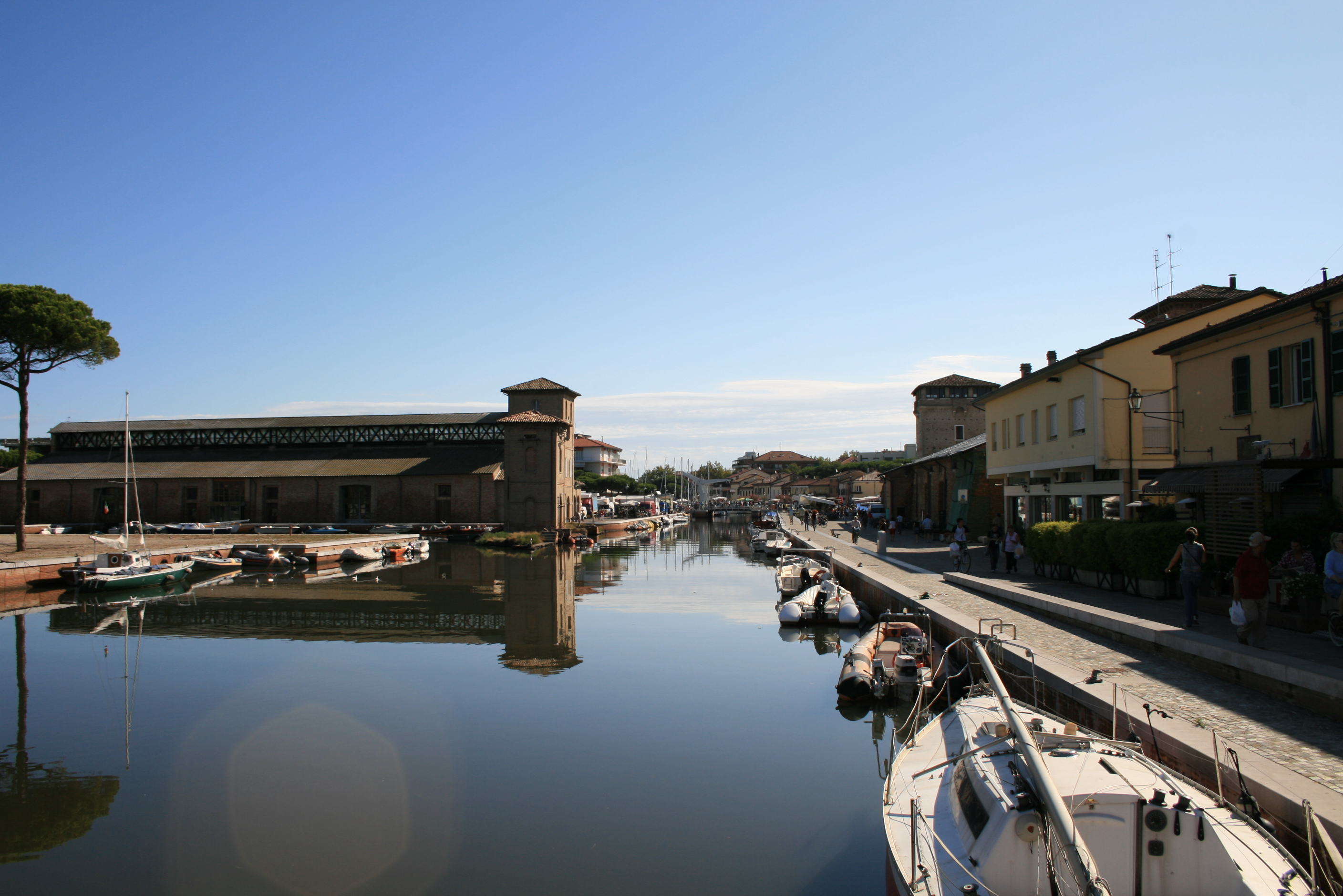 Cervia Magazzini del Sale